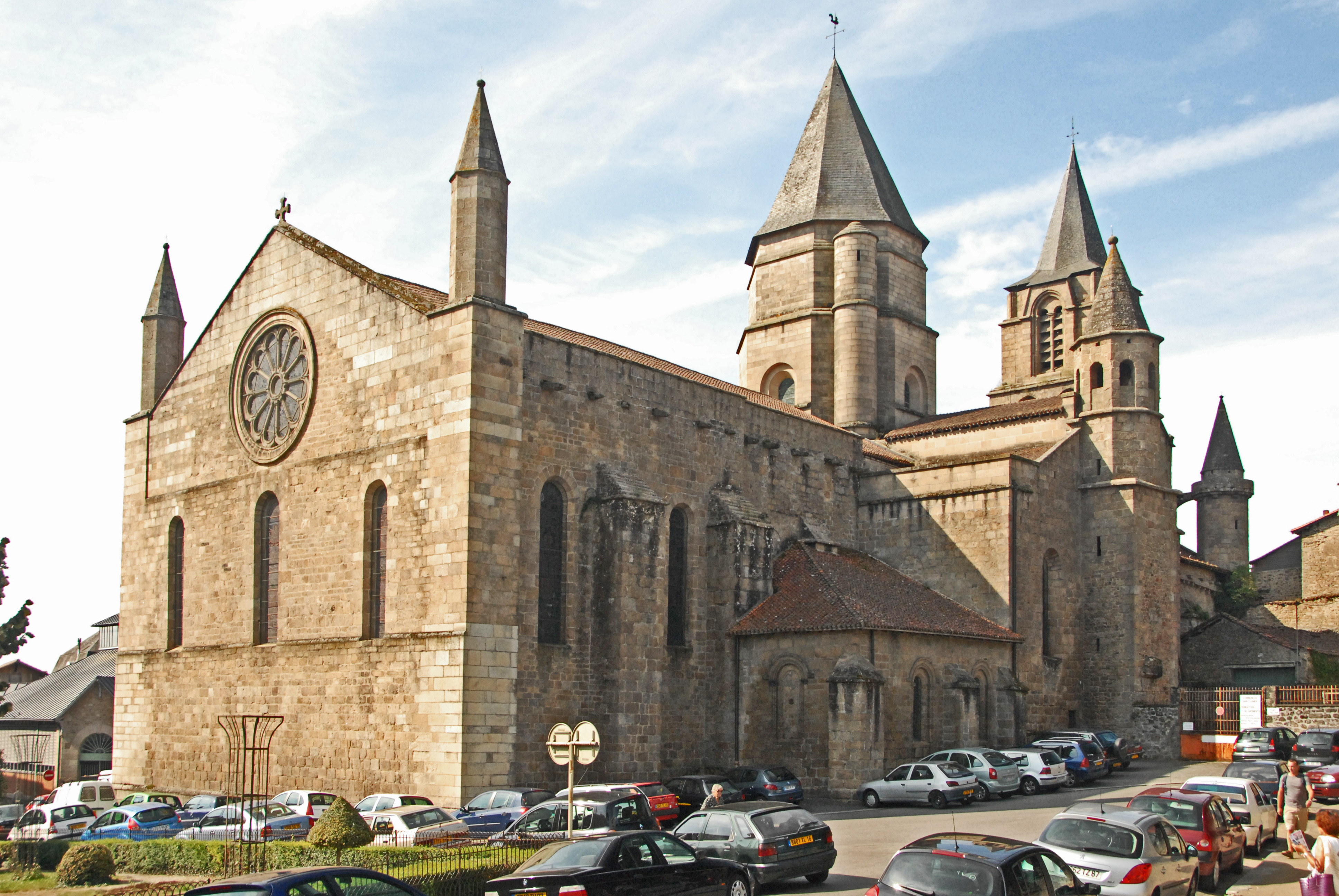 St-Junien, Chorhaupt u. Querhaus von NO